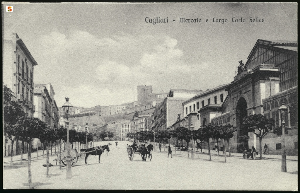 Il mercato vecchio del Largo Carlo Felice a Cagliari.